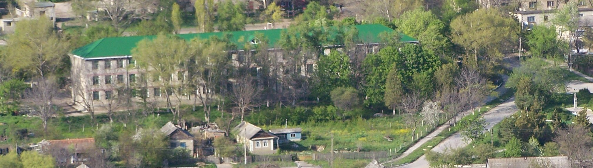 Лицей им.Эминеску